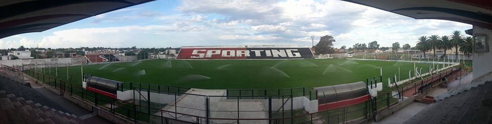 Tribuna visitante, estado Mendizabal, sobre calle Estrada.